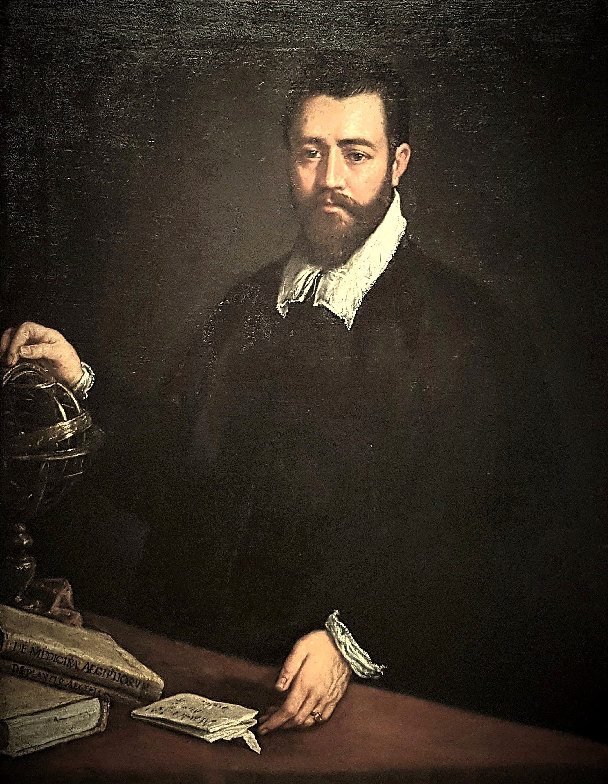 Prospero Alpini, Gemälde von Leoandro Bassano